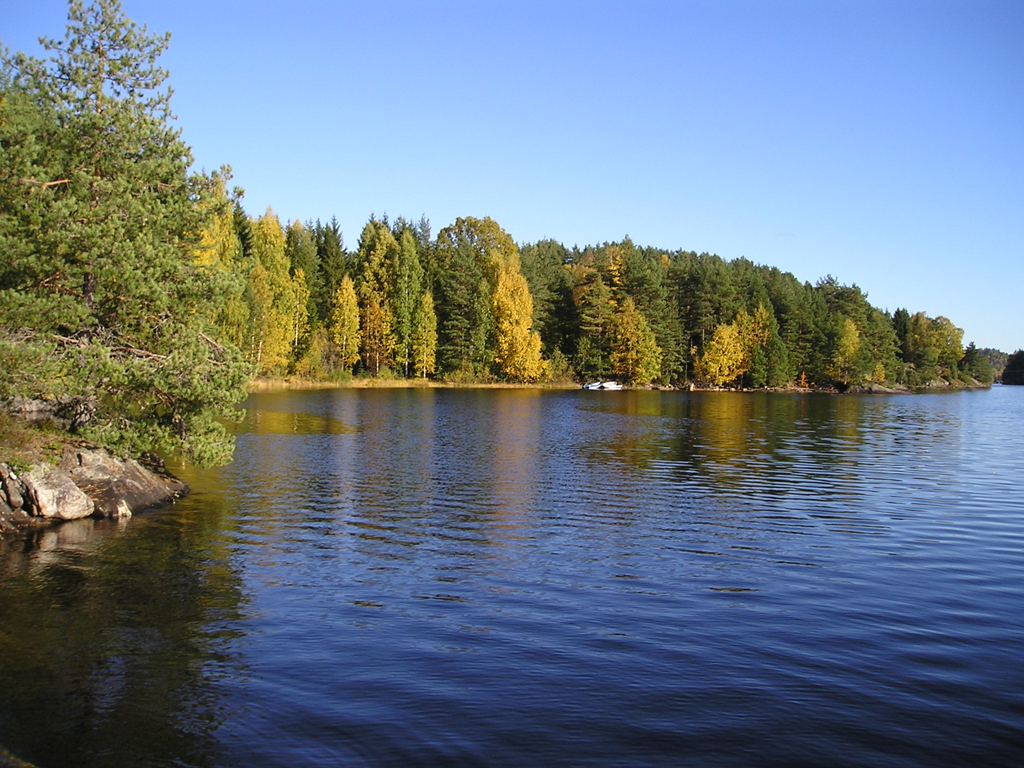 Toke, nedre. Kjendalsøya okt. 2004. Foto: H. E. Straume